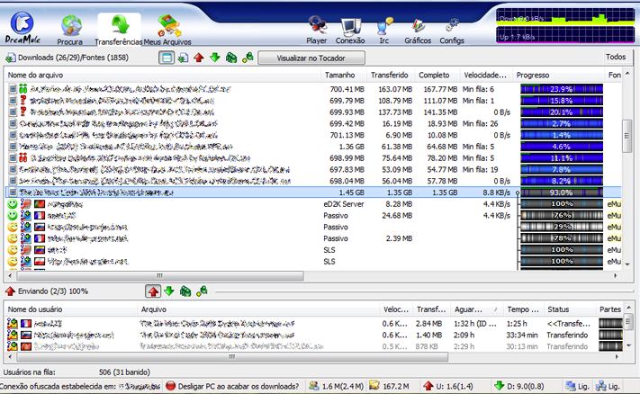 Imagem do programa DreaMule na tela de transferências no skin padrão da versão 3.0 - Redução em 25% do tamanho original